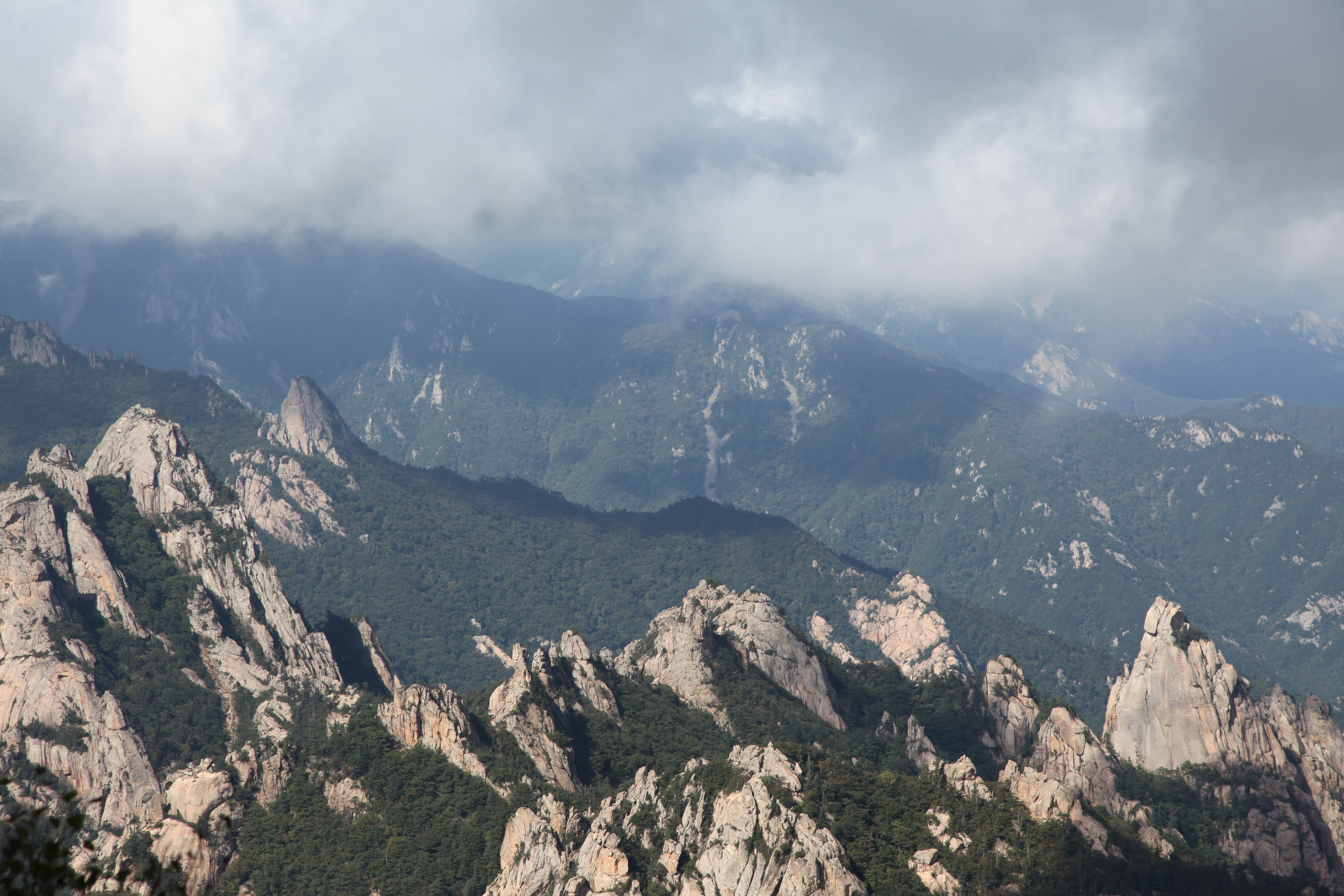 Скалистые горы Сораксан